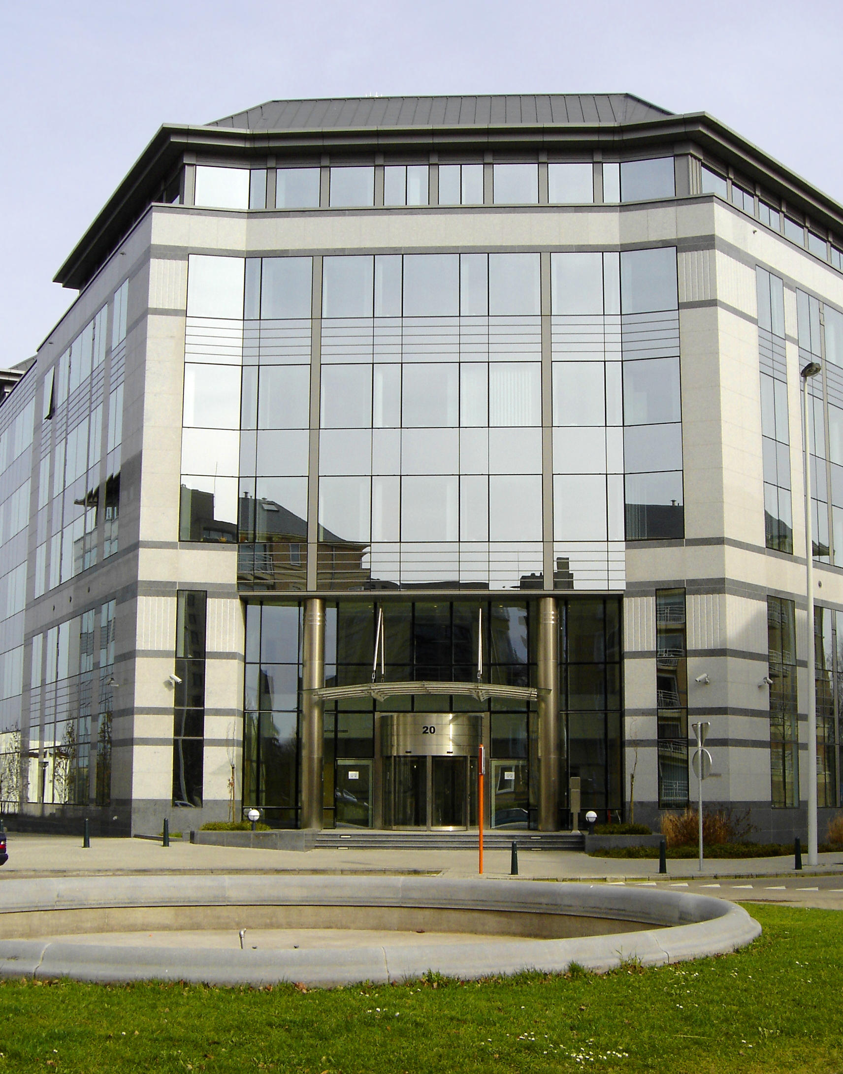 Belgique - Bruxelles - Woluwe Heights - avenue des Communautés 100-110 (Architecture postmoderne en Belgique)